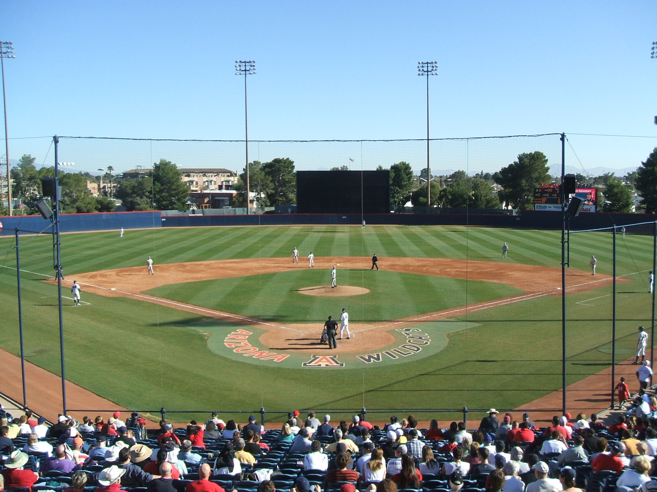 Arizona v. Gonzaga, Feb. 3, 2007